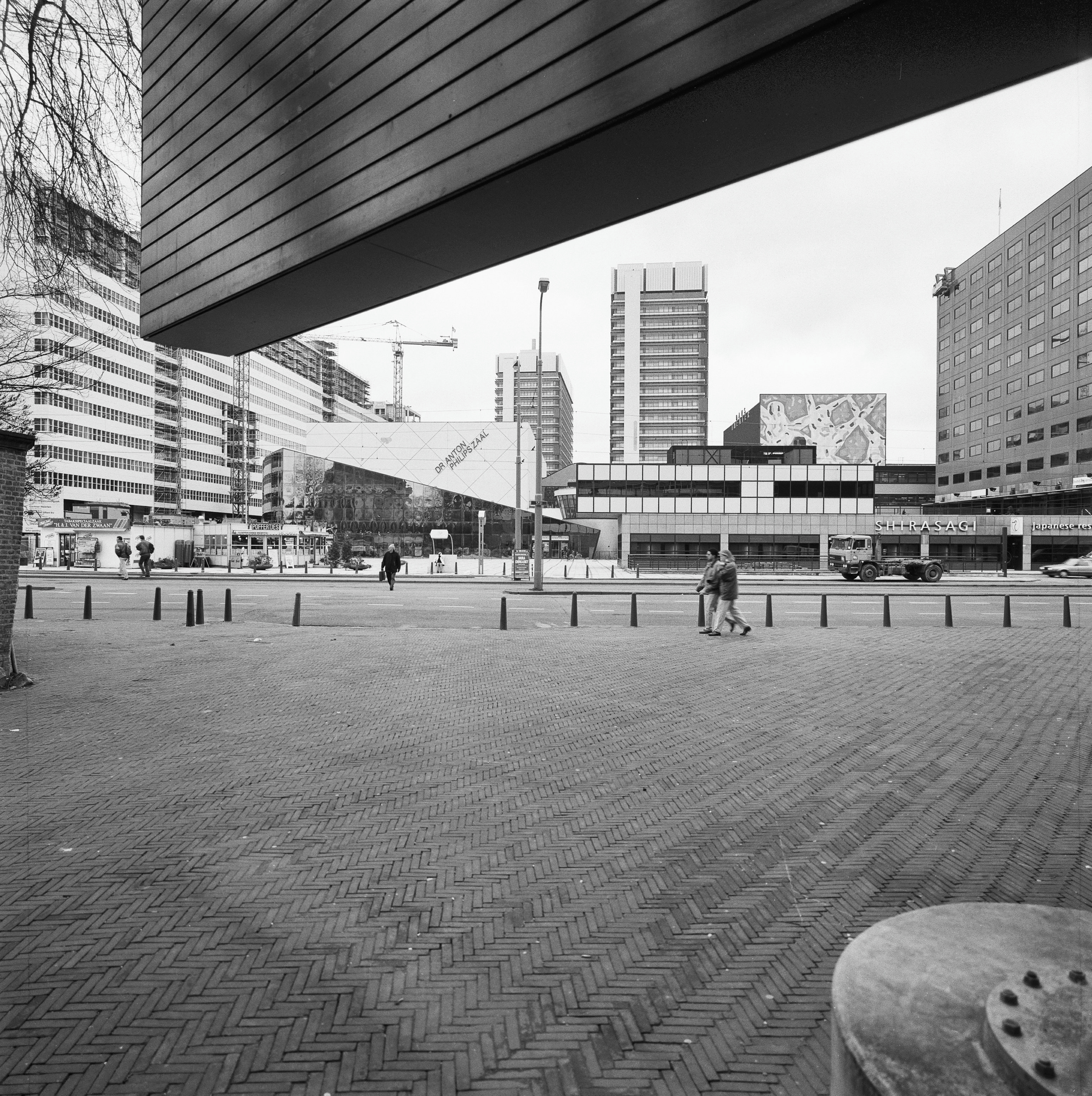 Exterieur OVERZICHT